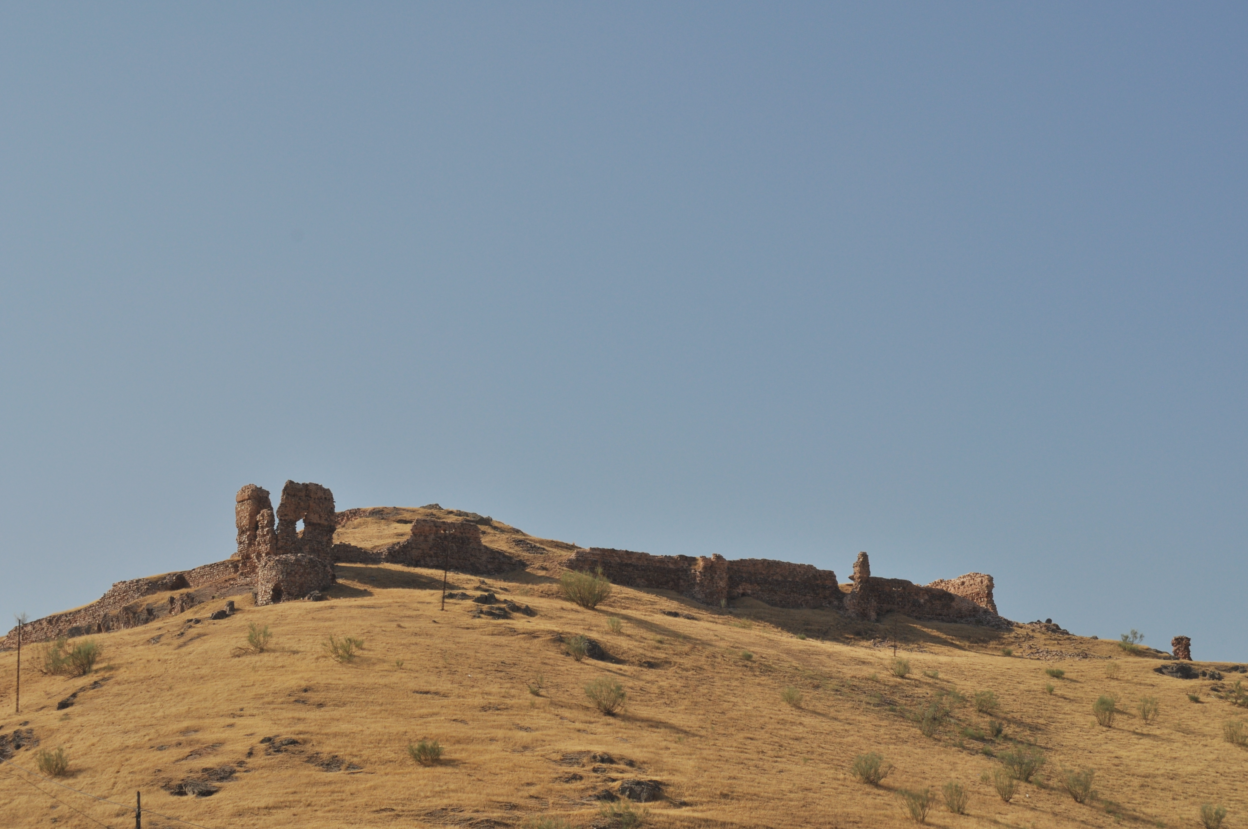 Alcaraz - 008